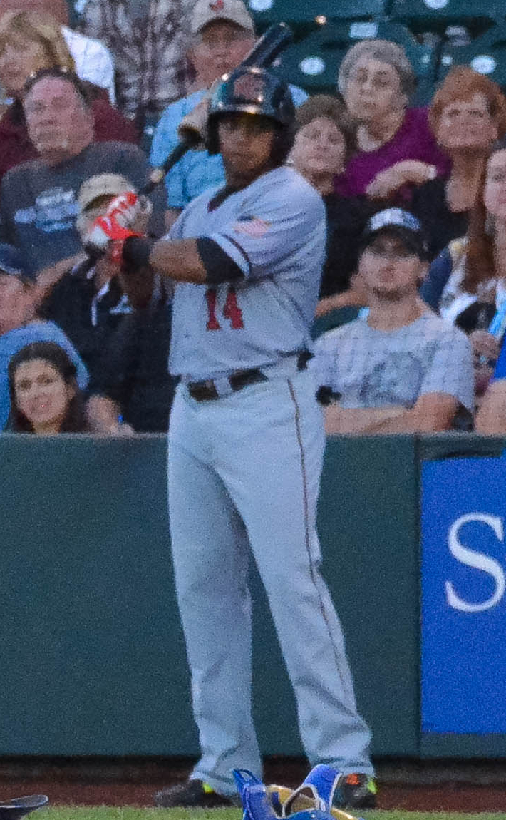 Darren Ford